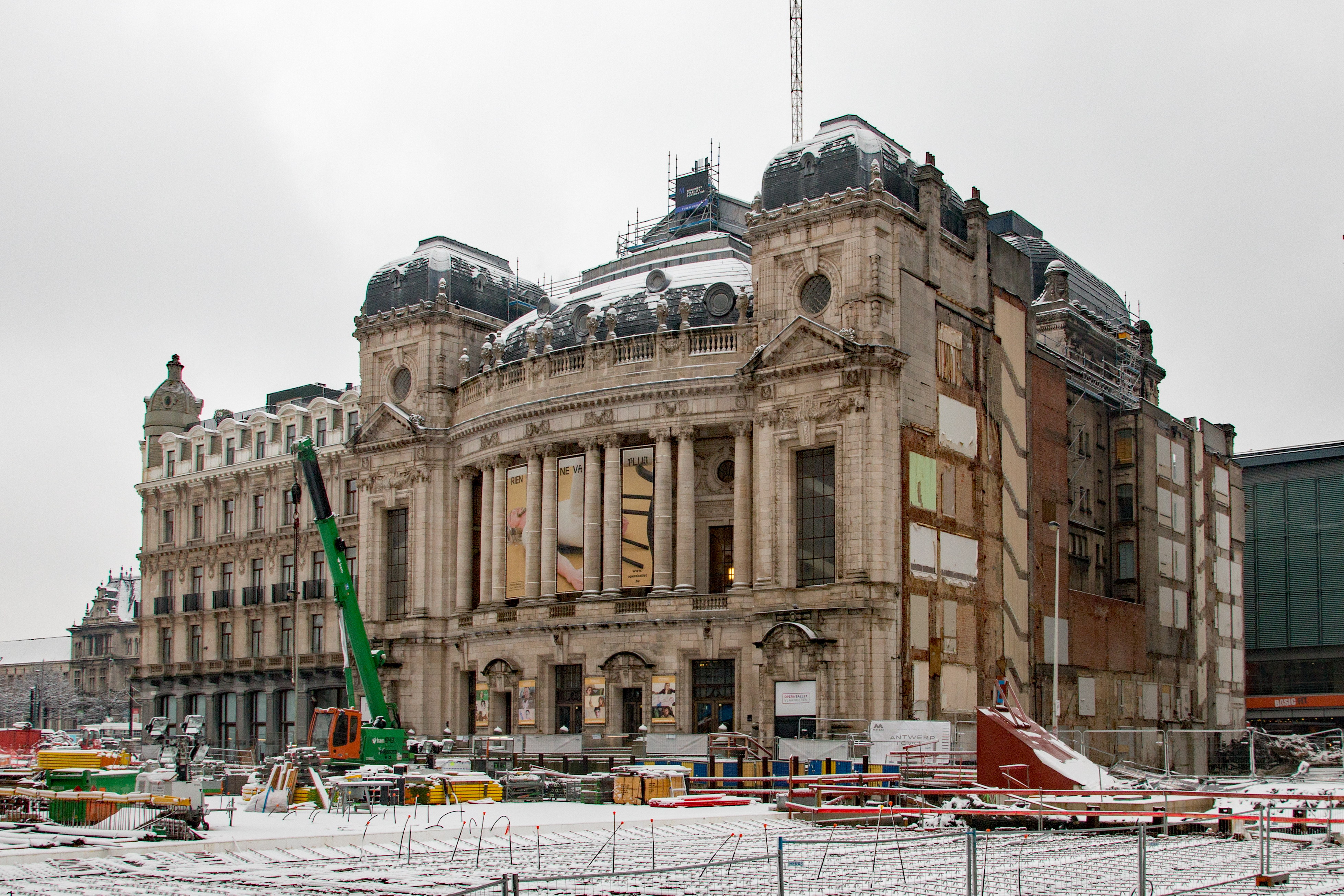 Antwerpen operagebouw